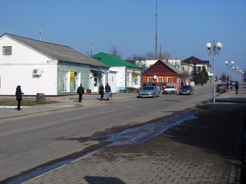 Марьина Горка. Улица Красноармейская